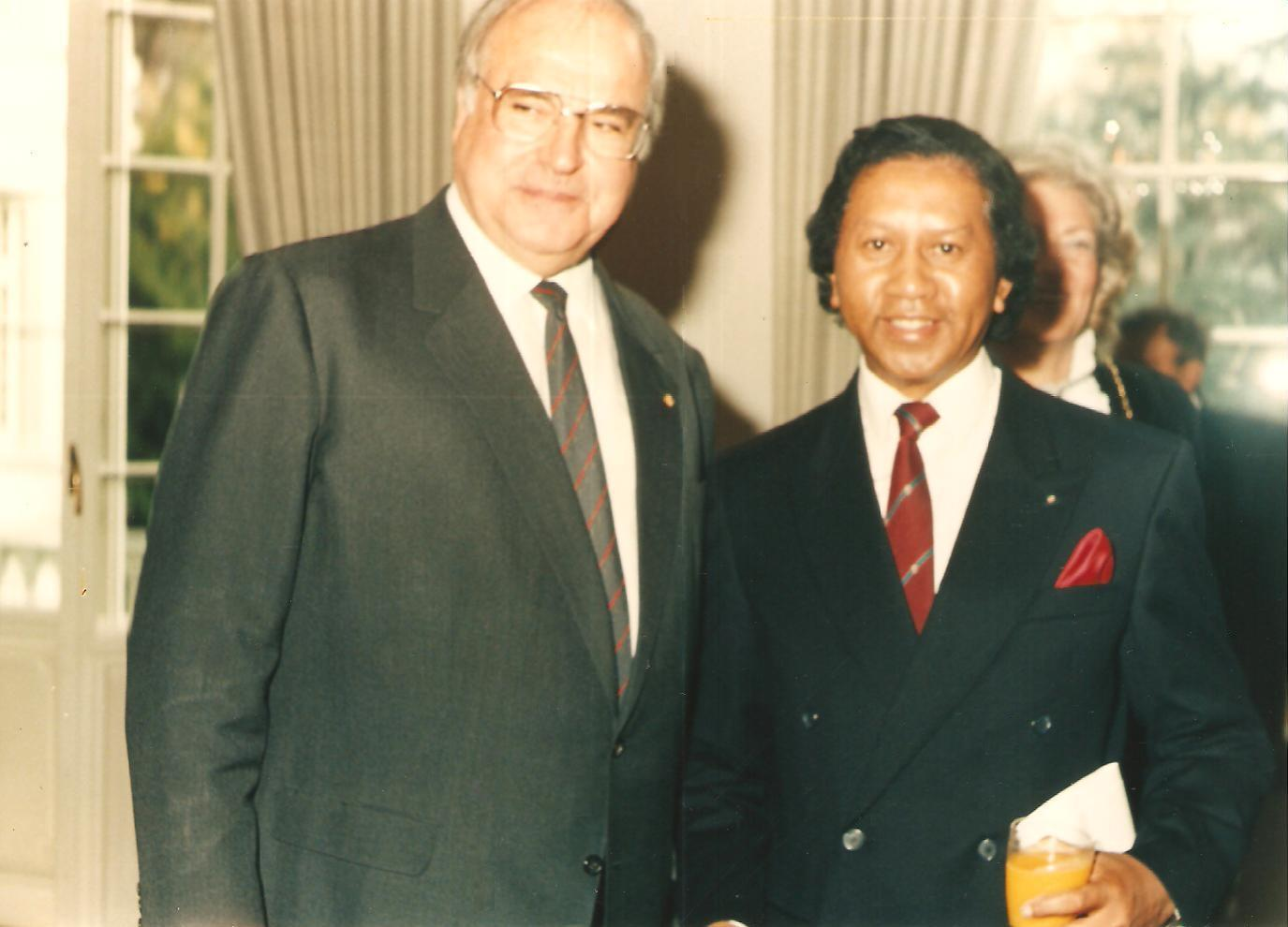 Le Chargé d’Affaires de la République démocratique de Madagascar Pierre Randrianarisoa est reçu par le Chancelier allemand Helmut Kohl lors d’une réception donnée en l’honneur du corps diplomatique, en 1986